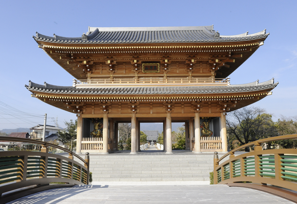 南大門（四天王を安置）